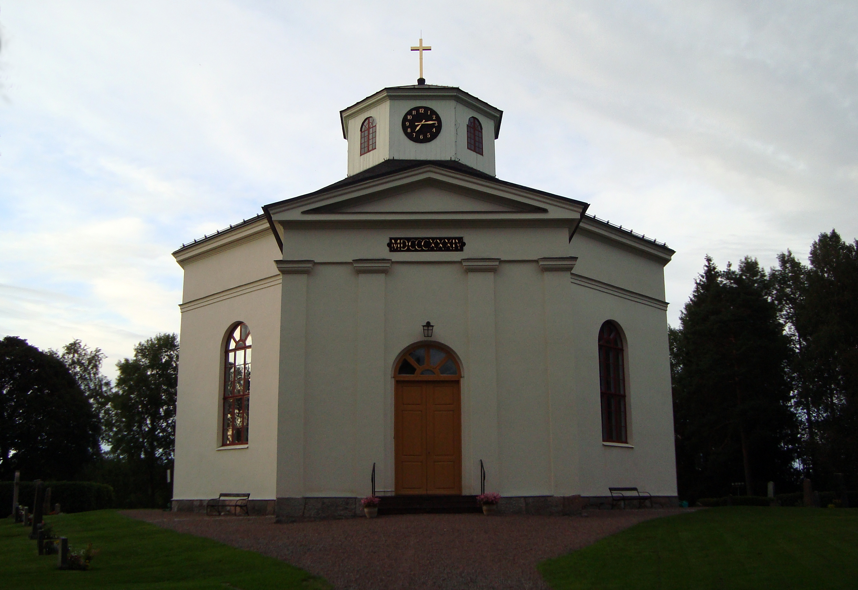 Silvbergs kyrka, Säters kommun, Sverige. Del av träd borttaget med klonverktyget i Photoshop CS2.